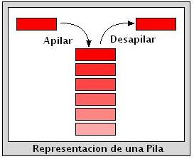 Representacion de Pila